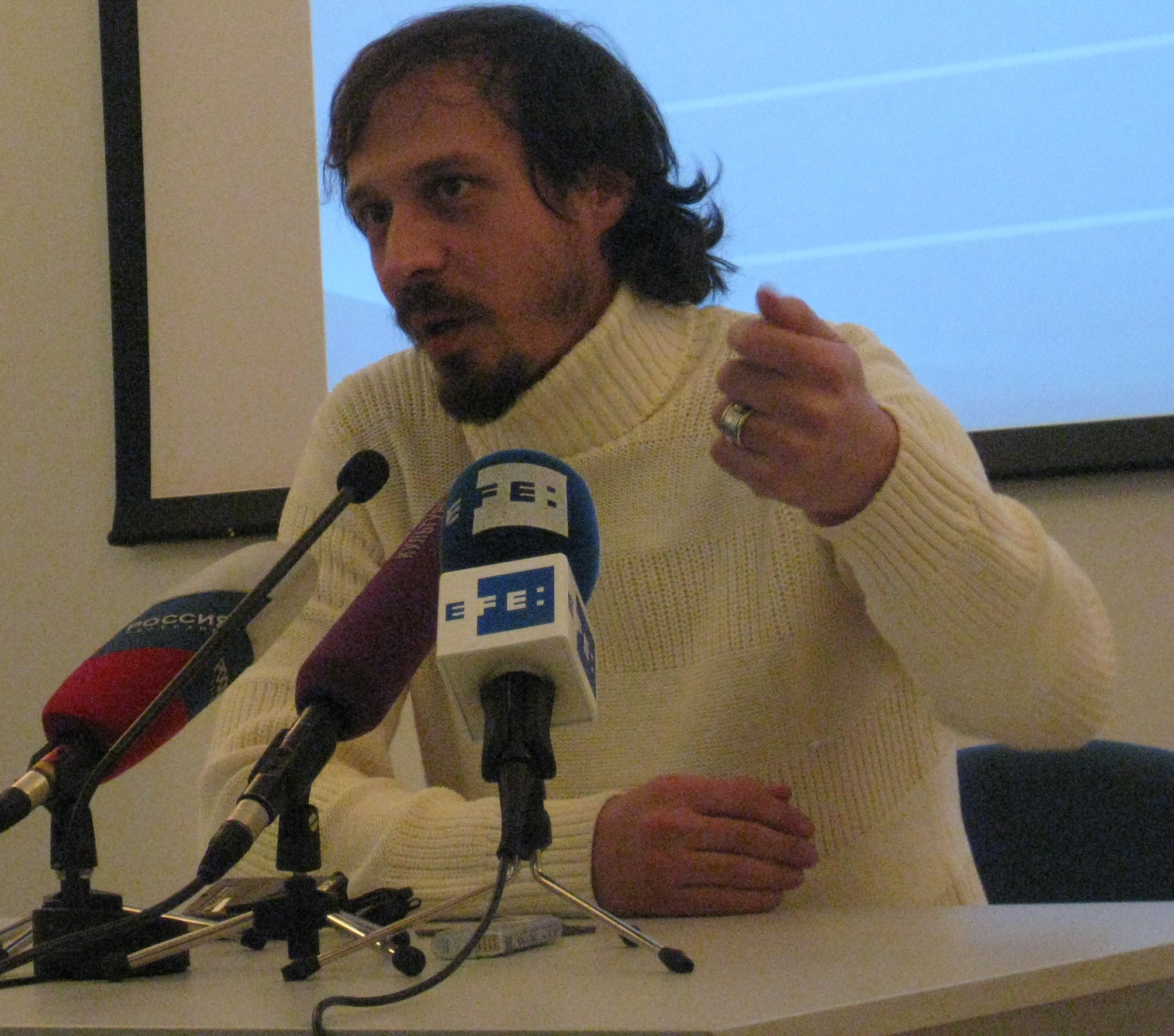 Феле Мартинез в Институте Сервантеса в Москве